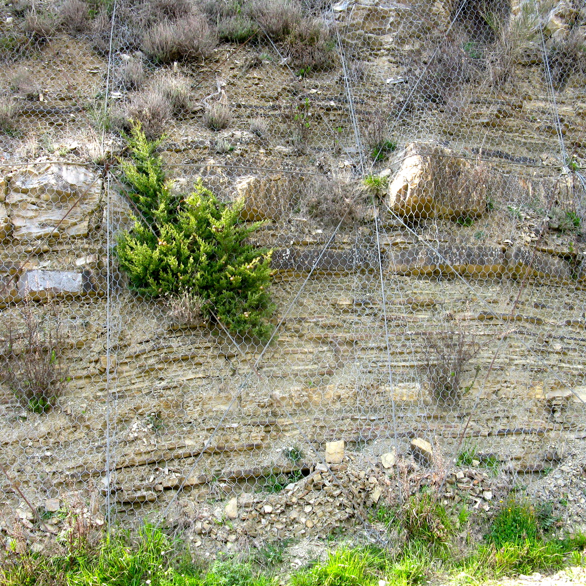 Esempio di formazione stratificata del Monte Morello presso il Rifugio Gualdo